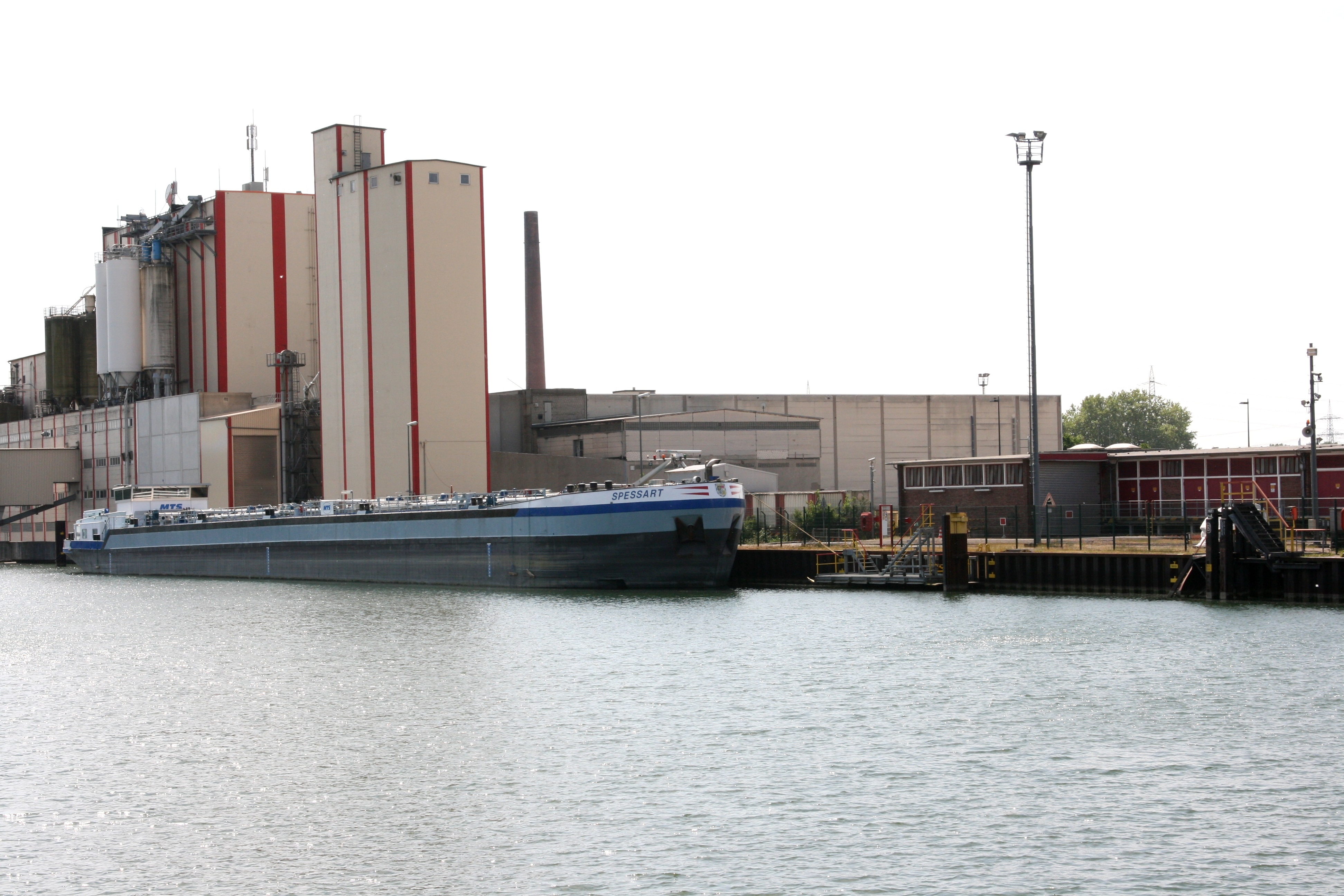 Müllers Mühle (mit Deppenapostroph "Müller's Mühle"), Am Stadthafen 42 in Gelsenkirchen